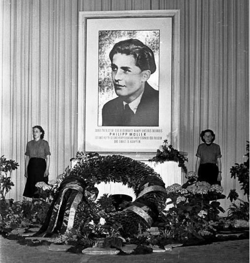 Leipzig, Gedenken an Philipp Müller Zentralbild- Illner 30.5.1952 IV. Parlament der Freien Deutschen Jugend in Leipzig 1952 (29.5.52) Eine Ehrenwache der Freien Deutschen Jugend an der Gedenkstätte des tapferen Patrioten Philipp Müller